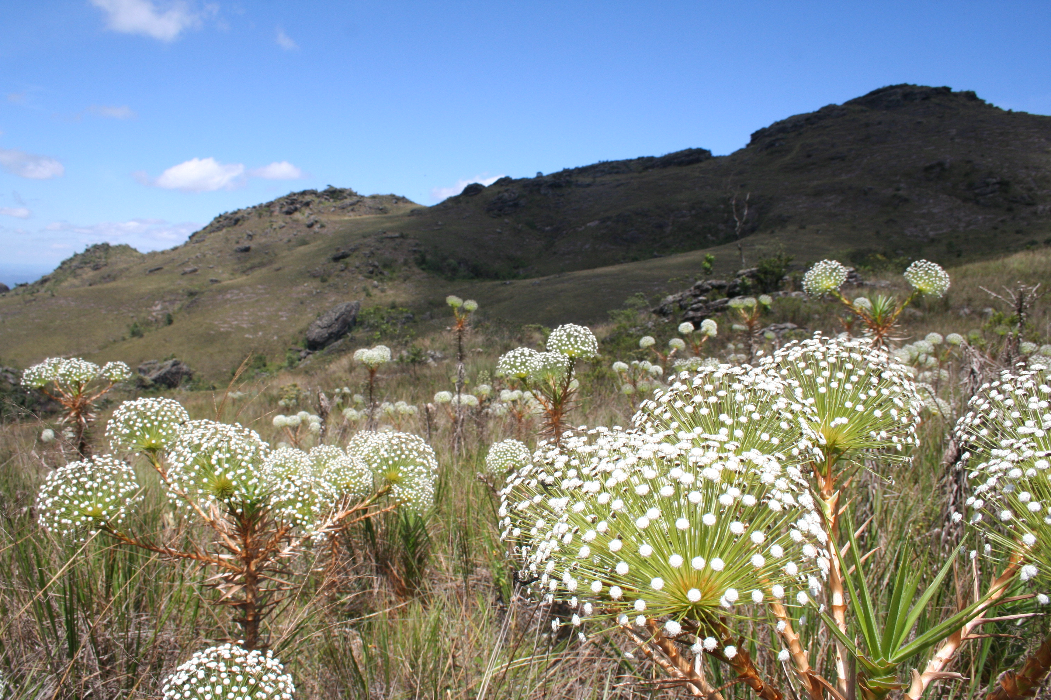 Actinocephalus no Itacolomy